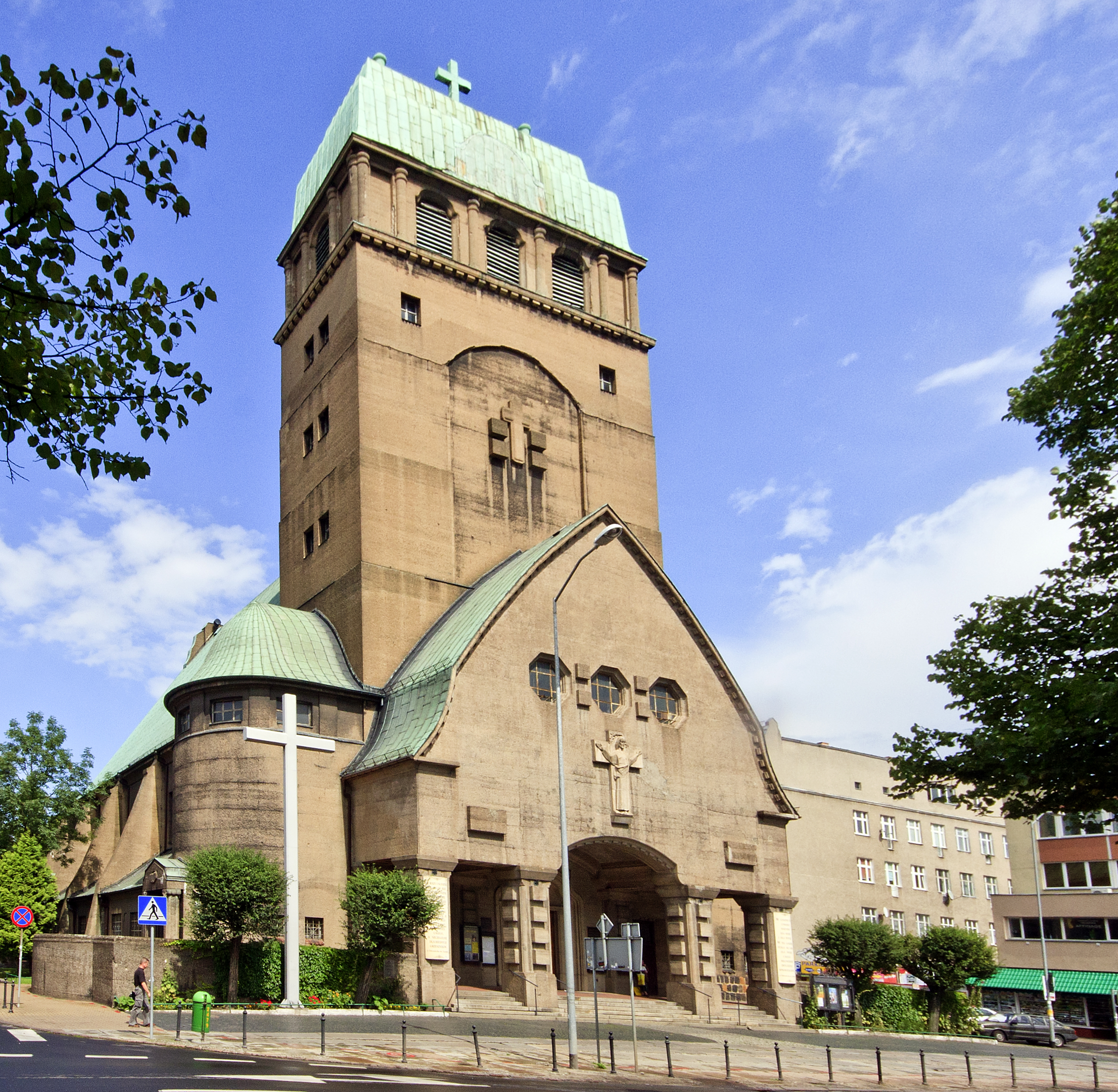 Jesu heliga hjärtas kyrka i Szczecin i Polen.